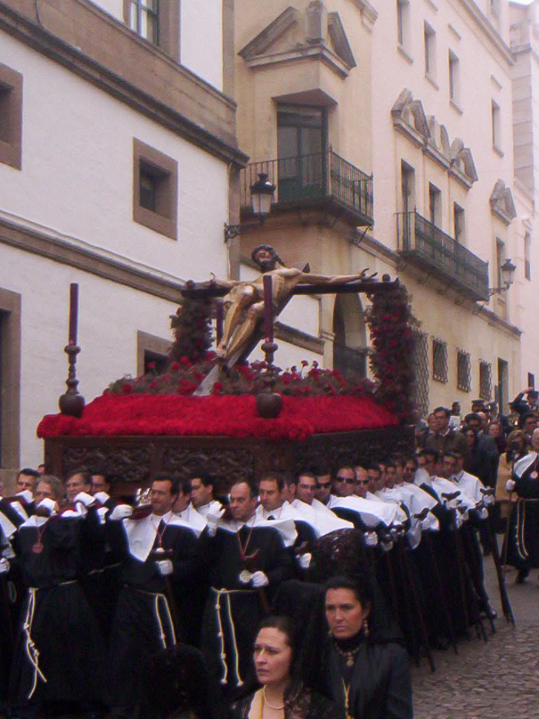 Cristo del Calvario (Cofradía de los Estudiantes) a su paso por la Gran Vía de Cáceres